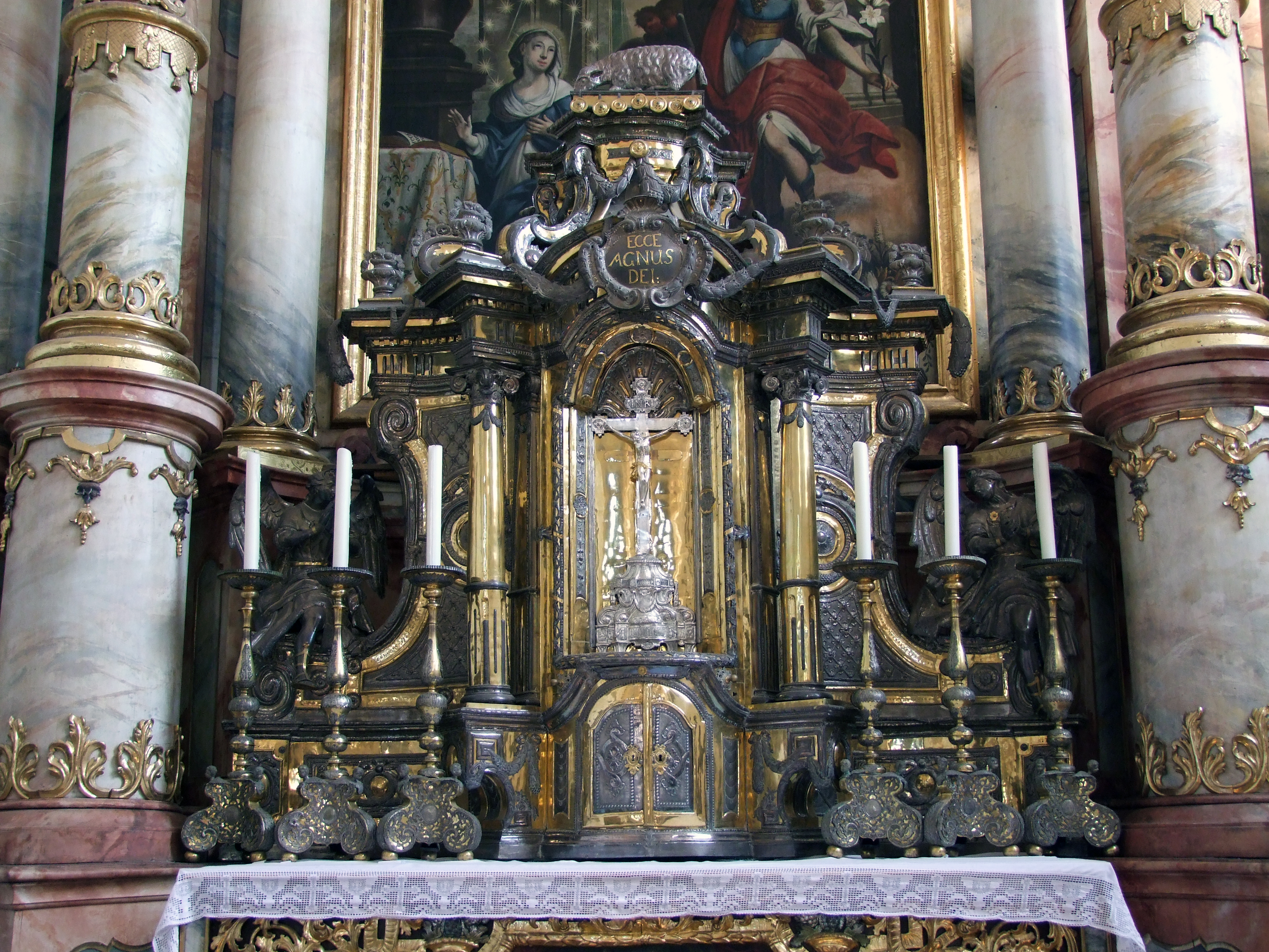 Mariä Verkündigung im oberschwäbischen Mindelheim. Ehemalige Augustiner, dann Jesuitenklosterkirche.